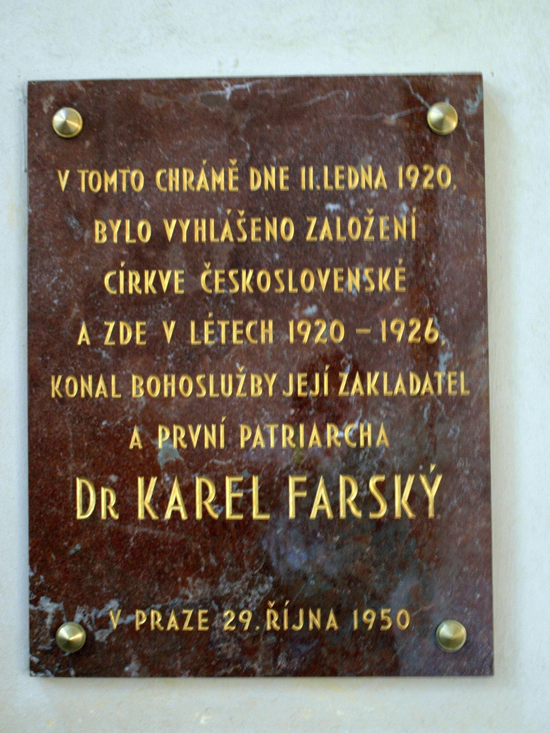 Chrám svatého Mikuláše na Starém Města pražském